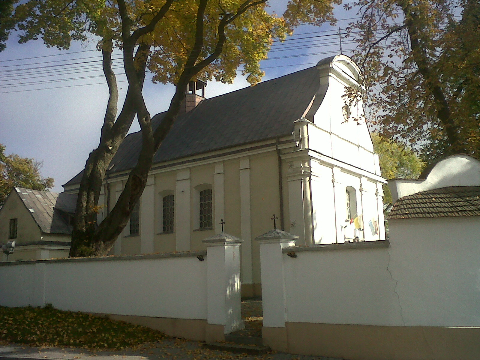 Iłów - kościół par. pw. Znalezienia Krzyża i Matki Bożej Królowej Polski, 1781, 1868